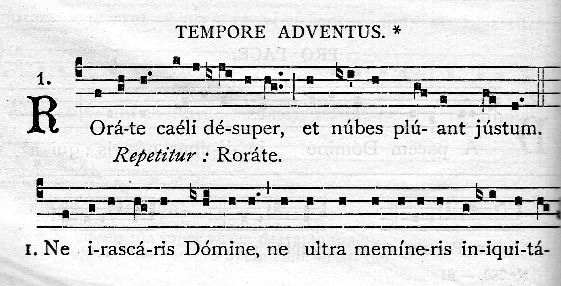 Adventlicher Wechselgesang "Rorate caeli desuper et nubes pluant justum" + "Ne irascaris Domine" aus: Liber Usualis Missae et Officii pro Dominicis et Festis, Paris-Tournai-Rom 1954, S. 1868